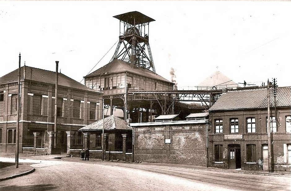 Ancien puits de mine d'Anzin disparu depuis 1935